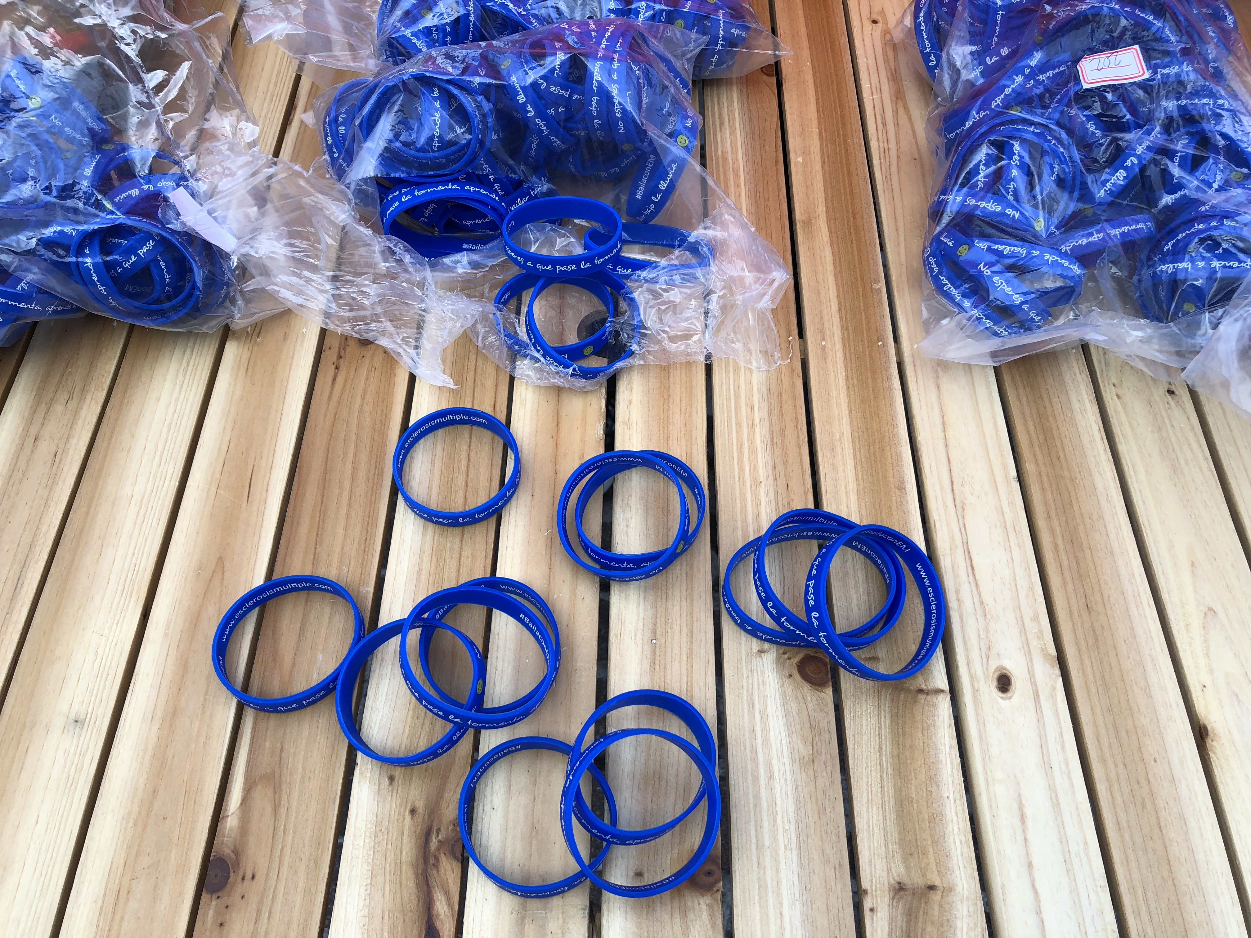 Polseres solidàries per lluitar contra l'esclerosi múltiple, que es van vendre en el pavelló del Delteco GBC en el darrer partit de la Lliga Endesa davant el Joventut de Badalona, per donar suport a Asier de la Iglesia i la seva lluita contra aquesta enfermetat. Les polseres porten gravat el lema "No esperes a que pase la tormenta, aprende a bailar bajo la lluvia".